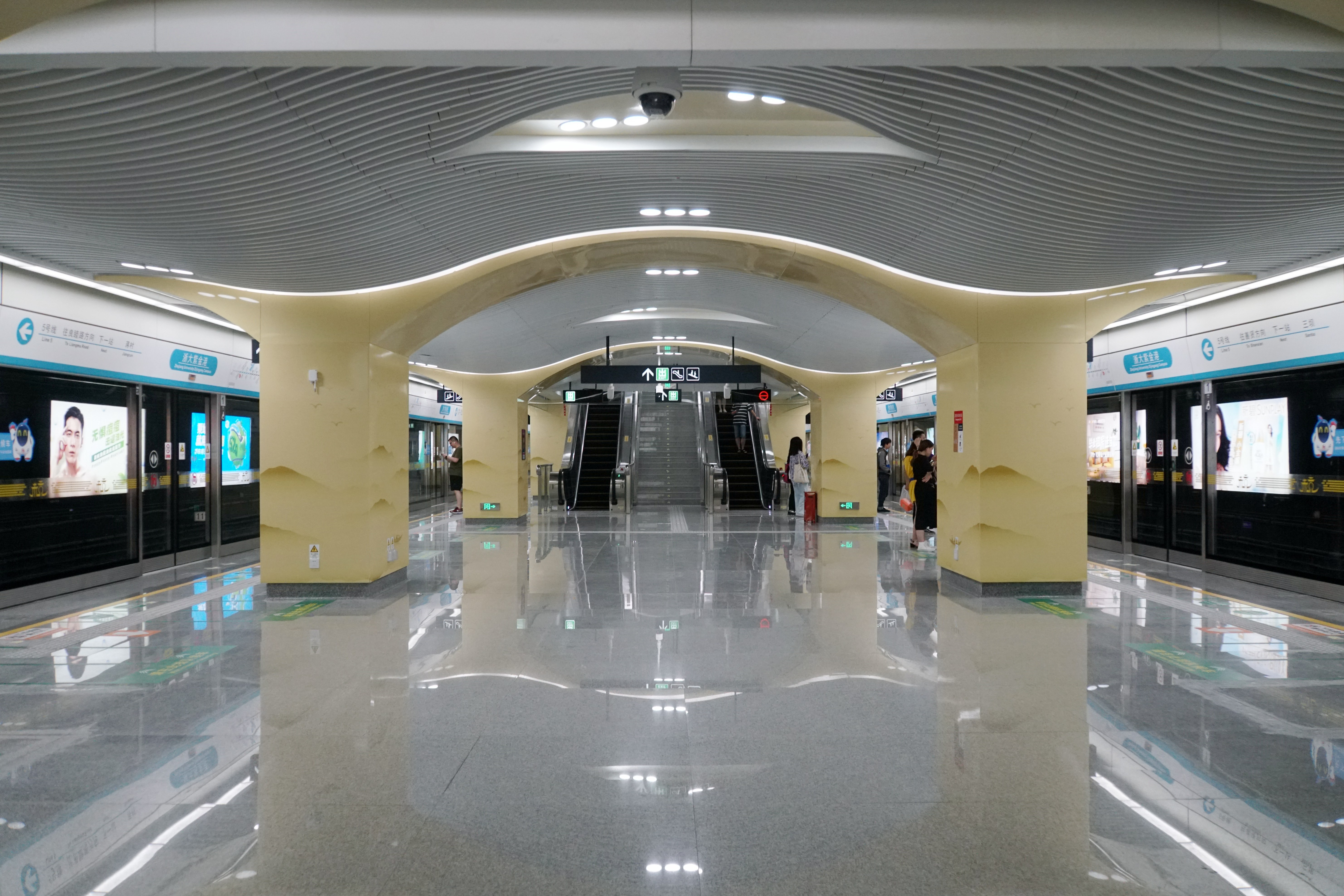 5号线浙大紫金港站台